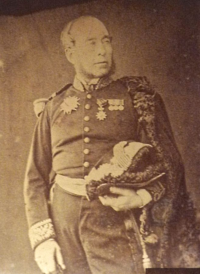 Photo - Portrait - Der französische Admiral Joseph-Maurice Exelmans